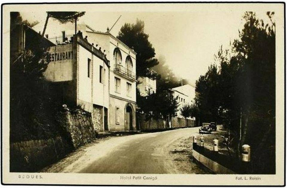 Gran Hotel Petit Canigo